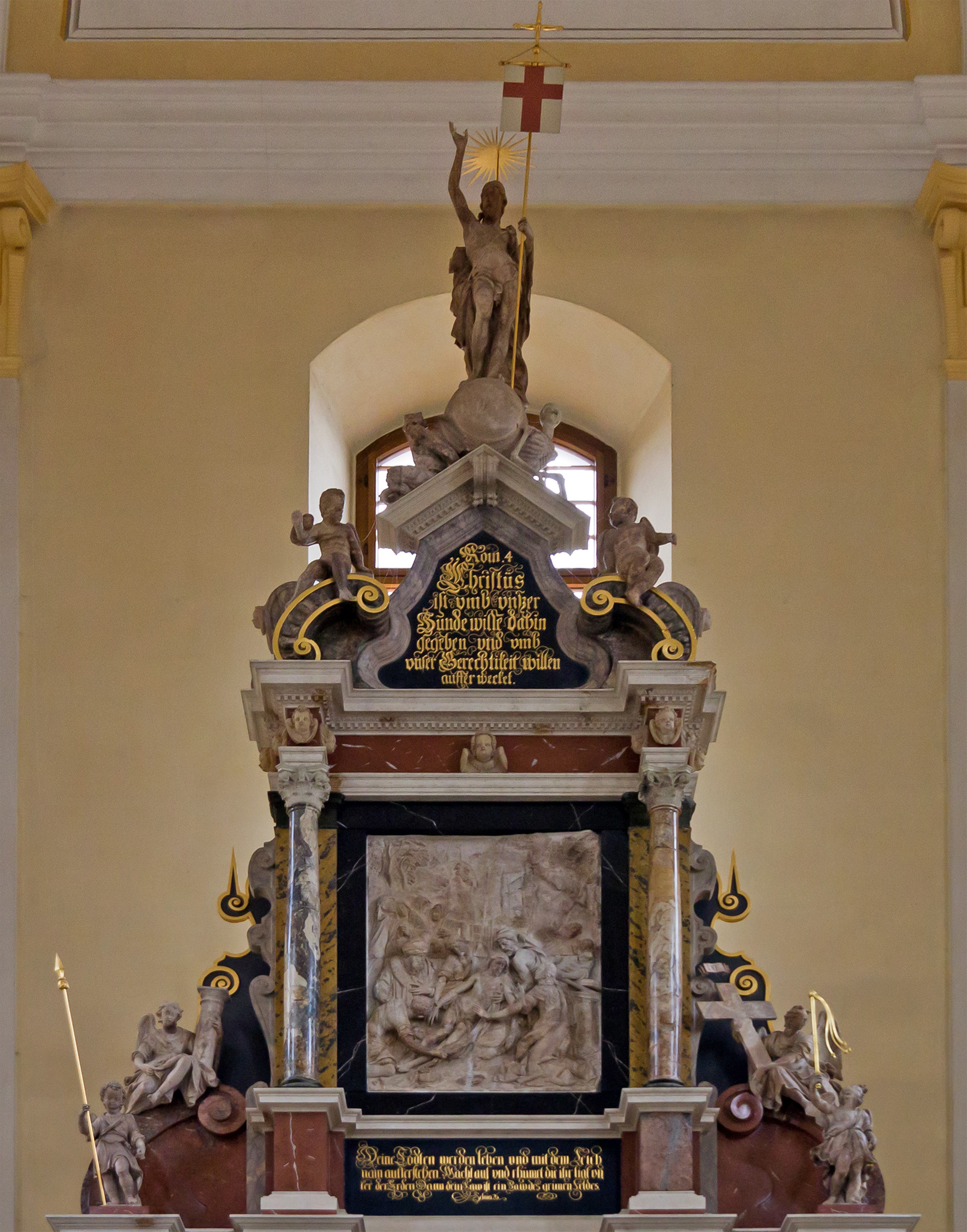 Nosseini-Altar, Oberteil. Horizontal gestaucht auf in etwa das korrekte Verhältnis Höhe/Breite